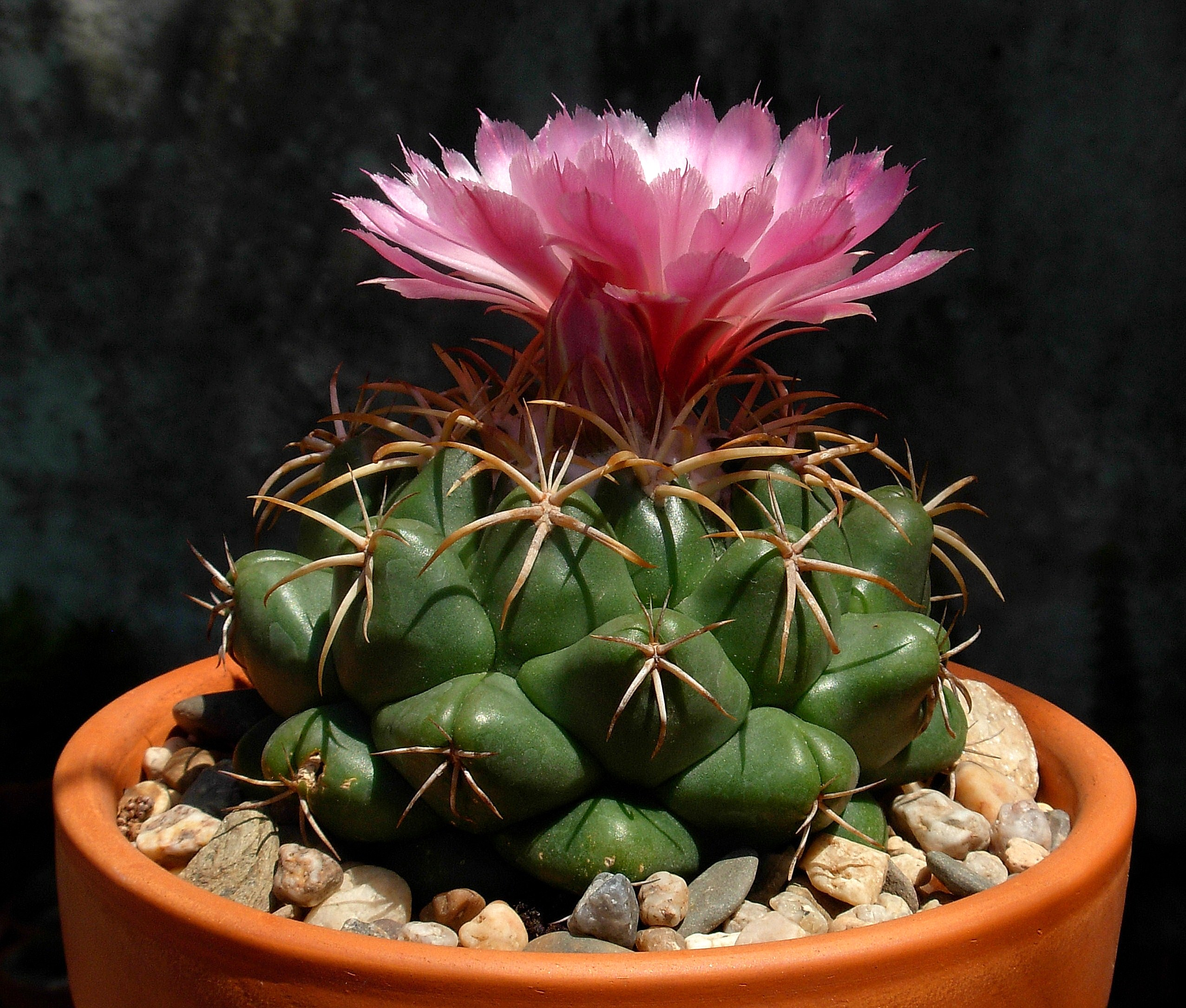 Coryphantha elephantidens; Publicada na Revista Suculentes, 4º Trimestre 2009, Nº 48.